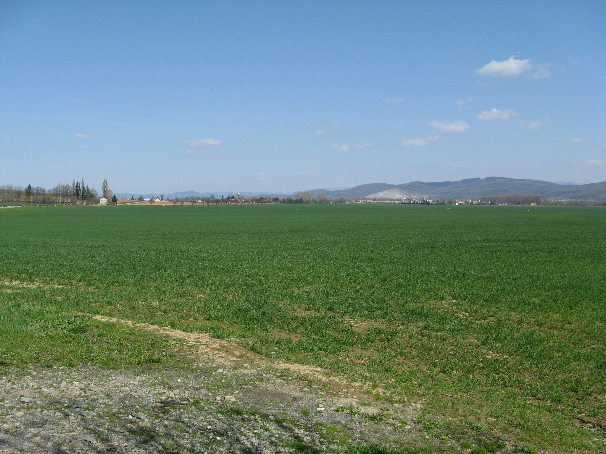 Česky: MB-pohled SZ směrem (v pozadí Vlachov,Lukavice)